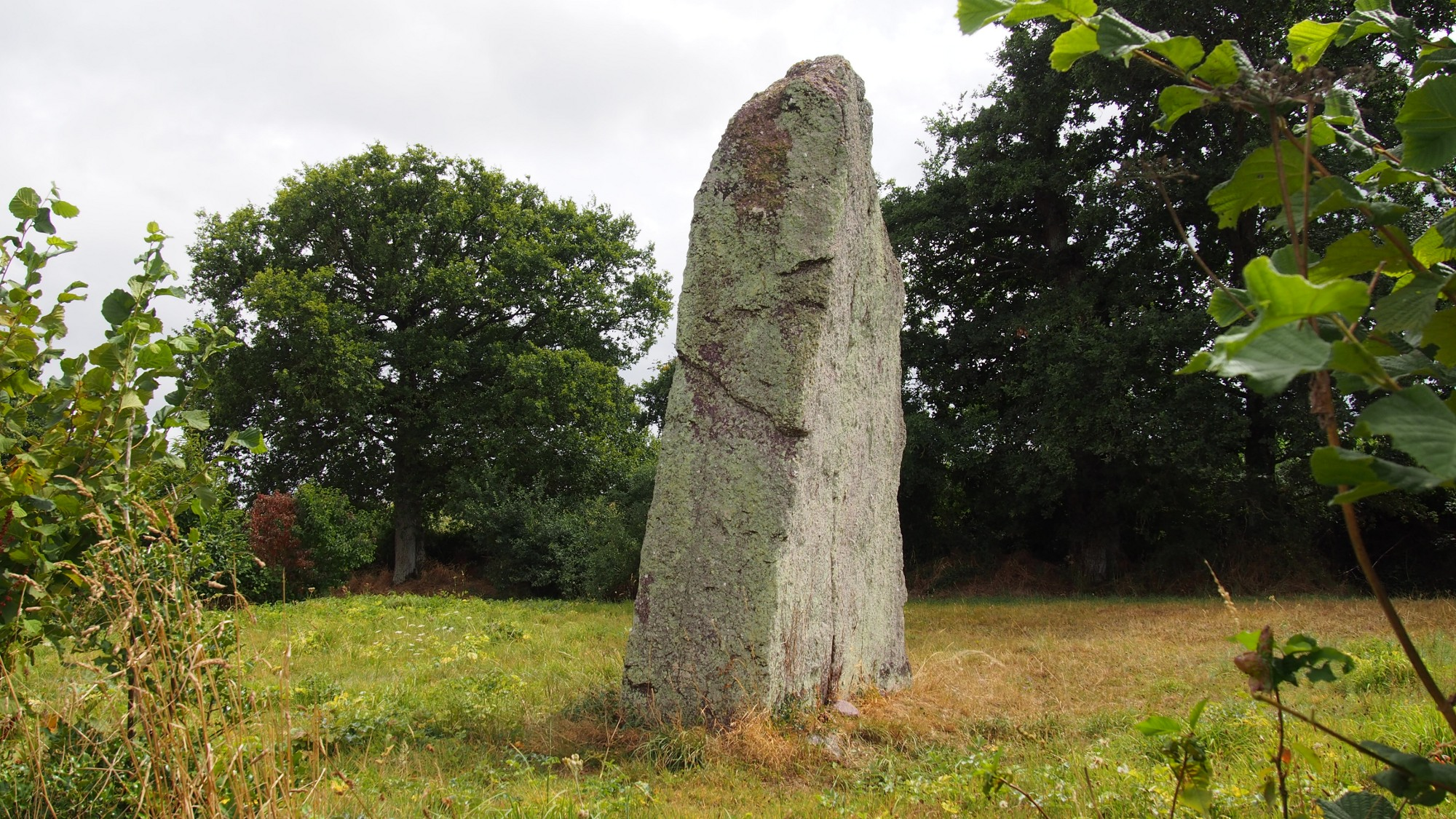 Menhir de la Pierre Longue, Iffendic